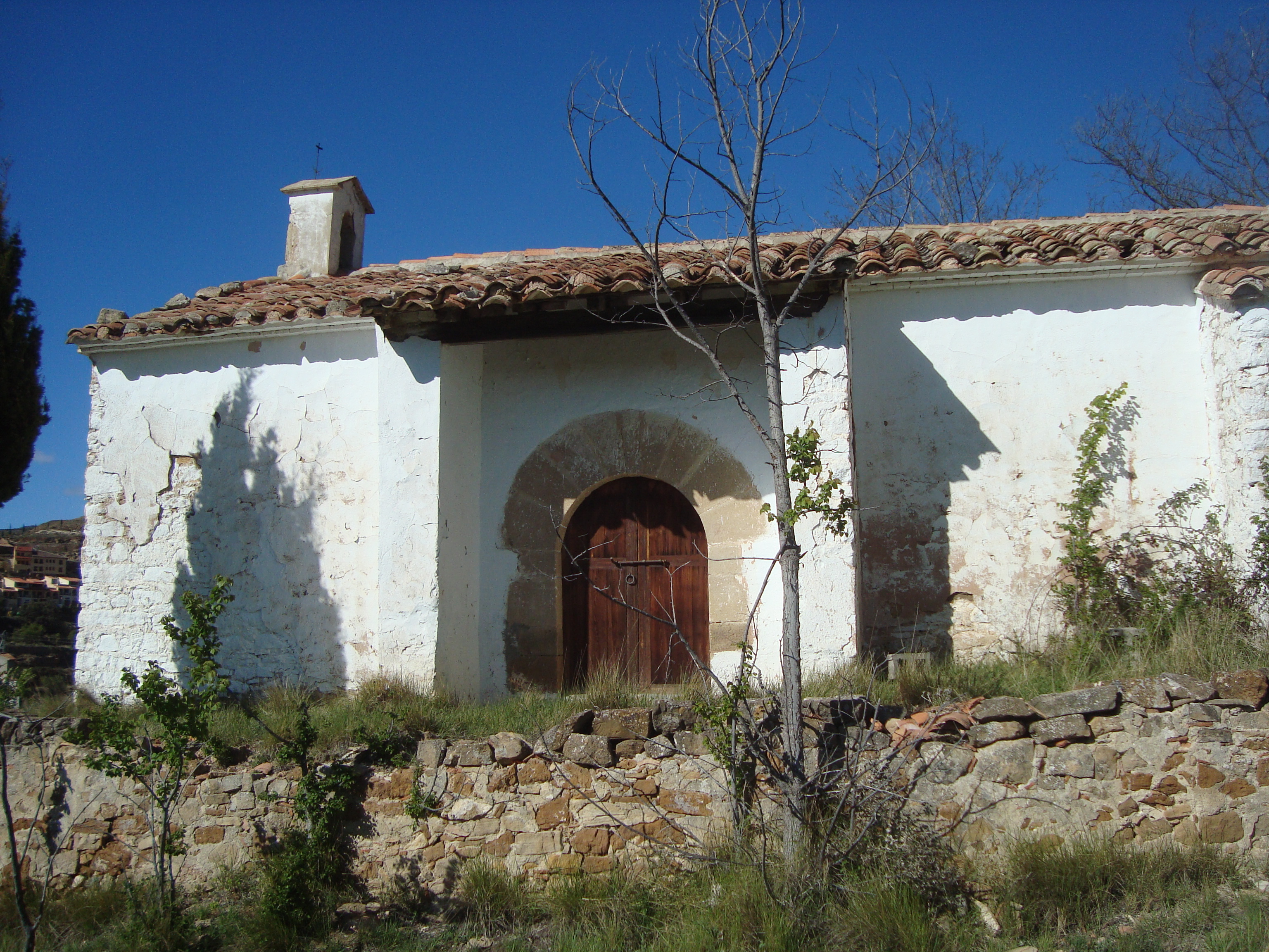 Ermita de Sant Blai (Cortes d'Arenós) 08.048-002.